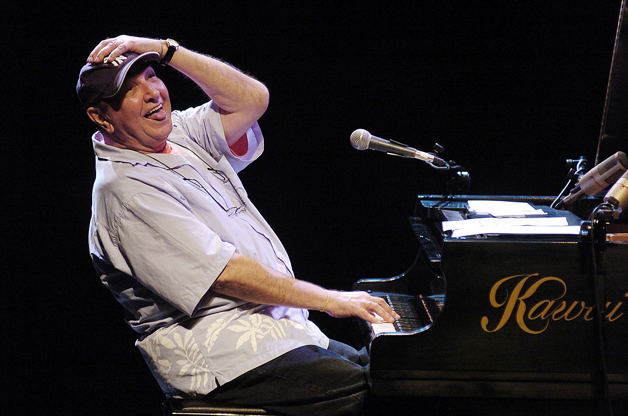 Auditório Ibirapuera. São Paulo. Brasil. Foto: Gerardo Lazzari